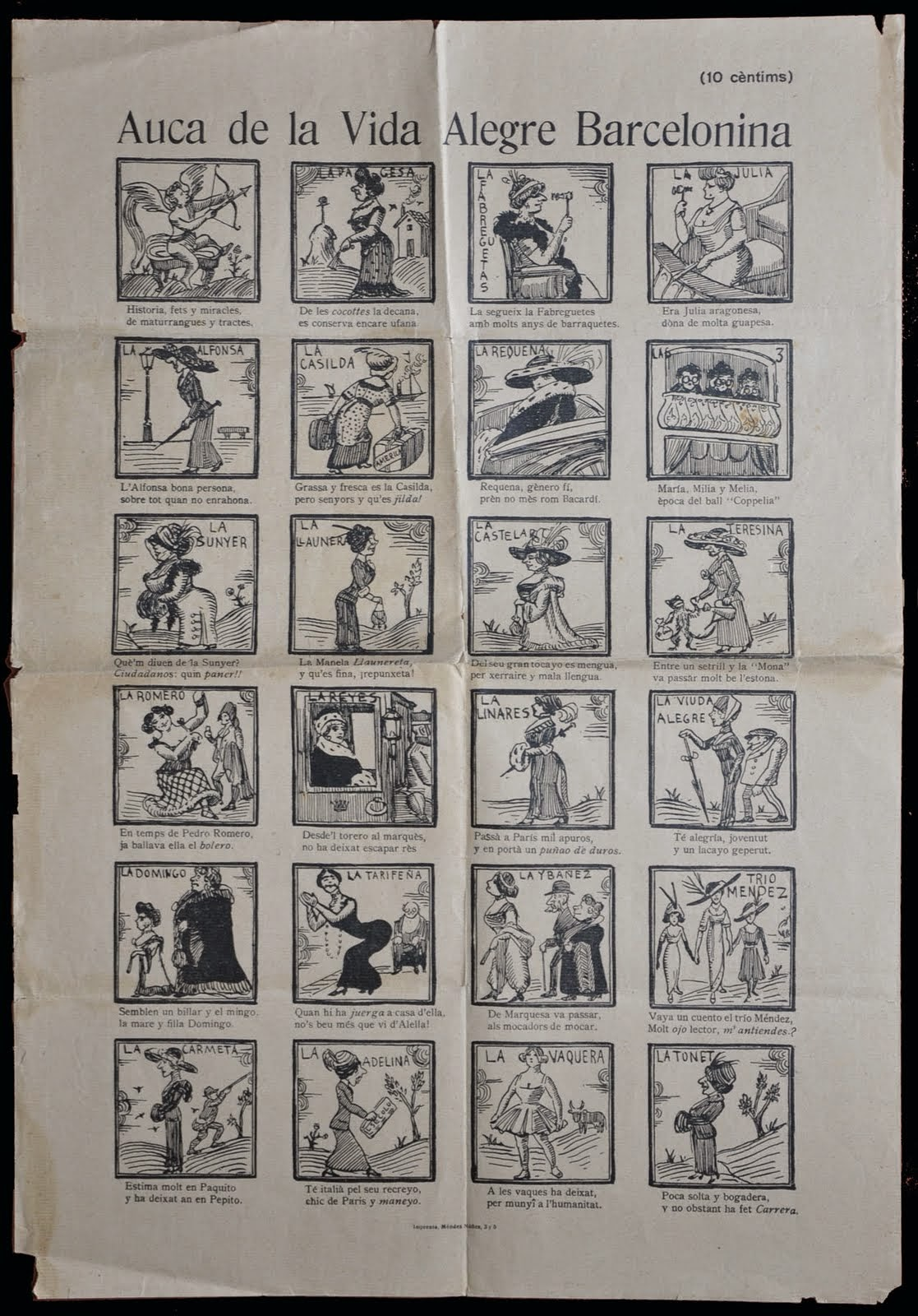 Auca de la vida alegre barcelonesa.